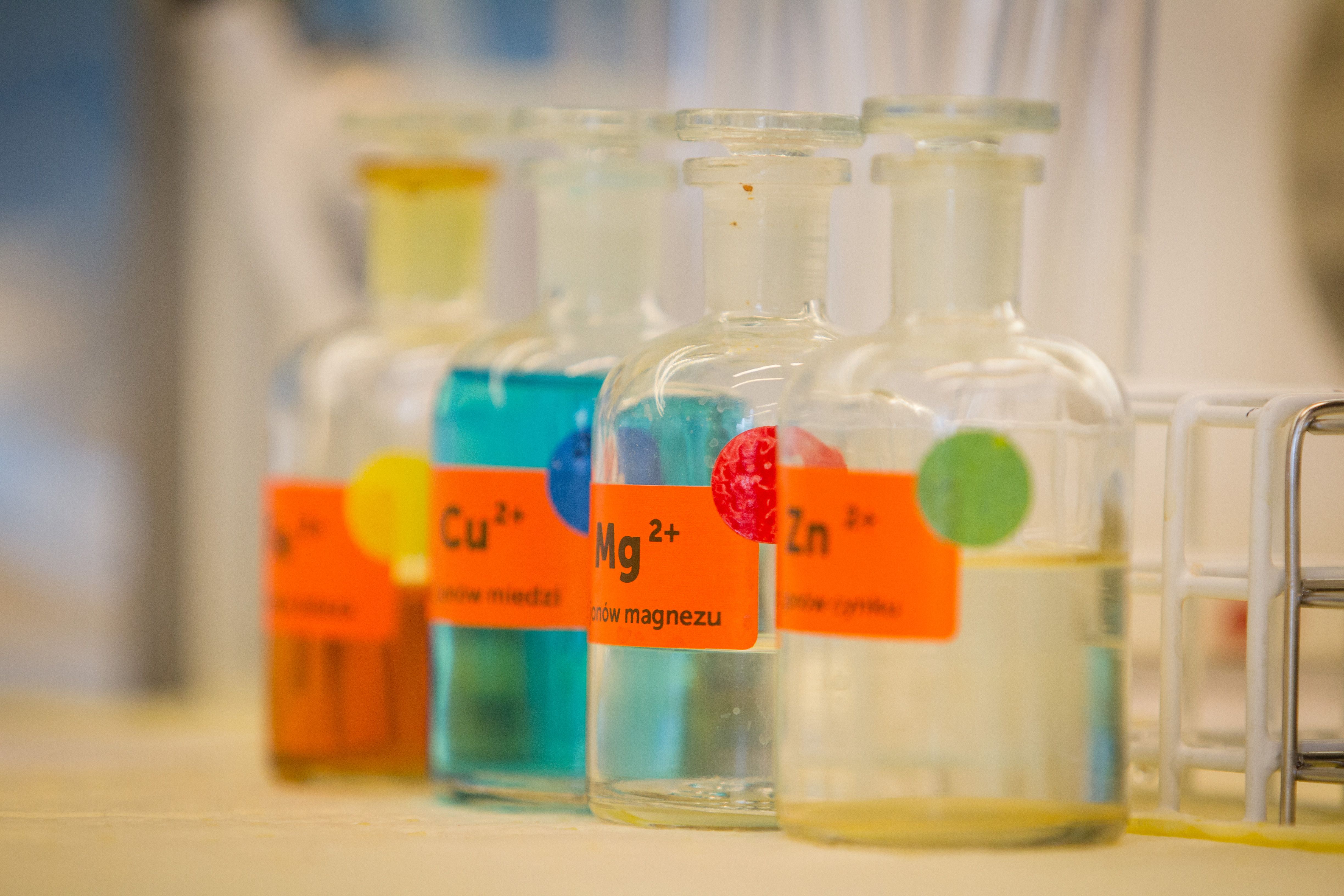 Laboratorium chemiczne, Centrum Nauki Kopernik. Butelki z roztworami kationów metali do analizy jakościowej, fot. Robert Kowalewski